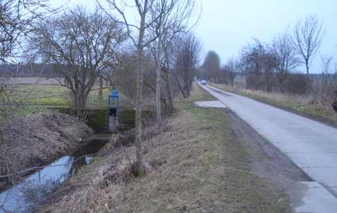 Weg durch das Recknitztal von Zehlendorf nach Recknitz. Wasserregulation der Recknitzwiesen erfolgt durch Bauwerke, wie links im Bild zu sehen ist.